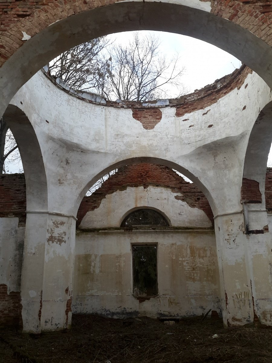 Браздзецкая Слабада. Царква Свяціцеля Мікалая Цудатворцы